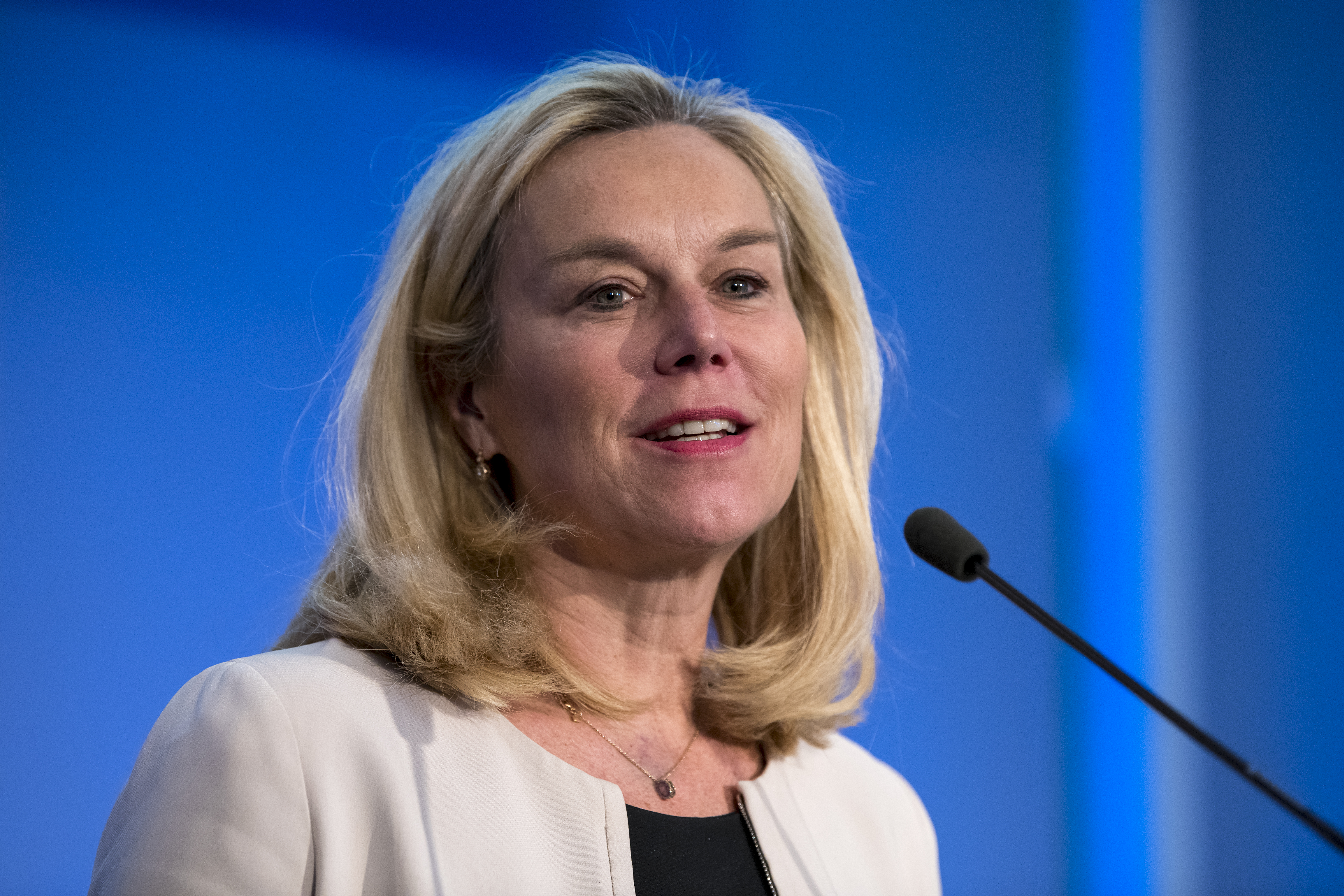 Na zijn beediging als minister van Buitenlandse Zaken door Zijne Majesteit de Koning, op paleis Noordeinde, meldde Stef Blok zich, nog in jacquet, bij zijn ministerie. Daar werd hij verwelkomd door secretaris-generaal Joke Brandt. Na een korte kennismaking met zijn naaste medewerkers tekenden minister Kaag en hij voor de overdracht van het ministerie. Kaag nam sinds het vertrek van Halbe Zijlstra de functie van minister van Buitenlandse Zaken waar. Aansluitend werd de nieuwe bewindsman te midden van zijn nieuwe collega's welkom geheten door de secretaris-generaal en minister Kaag. Foto's BZ | Aad Meijer